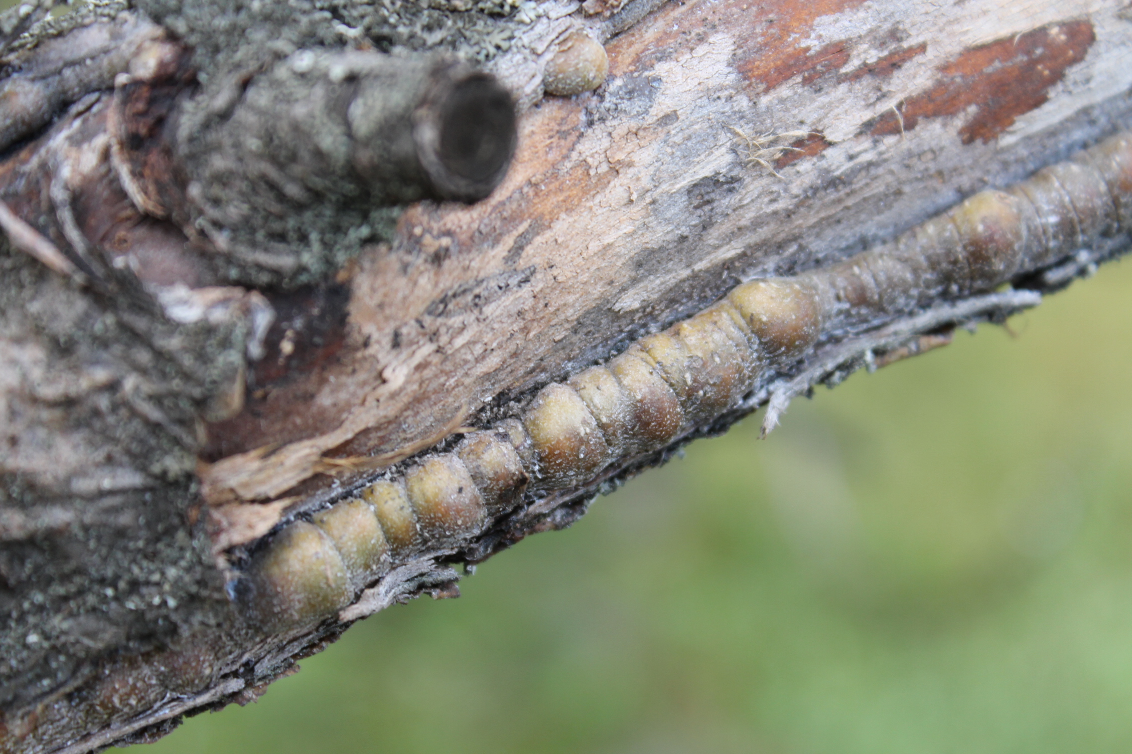 zával v místě sání mšice krvavé, kalus, jabloň